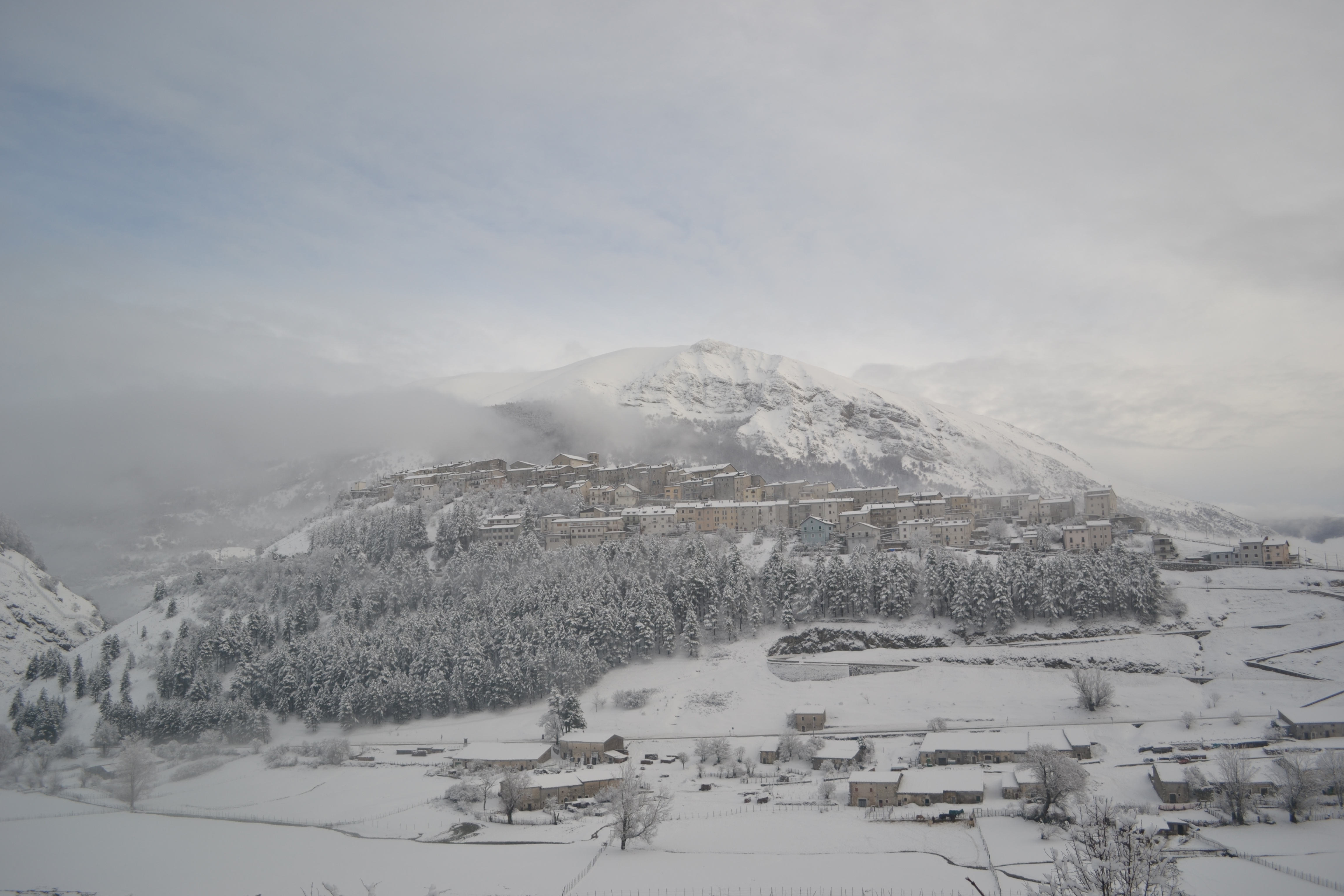 Veduta di Opi Opi paese This is a photo of a monument which is part of cultural heritage of Italy.